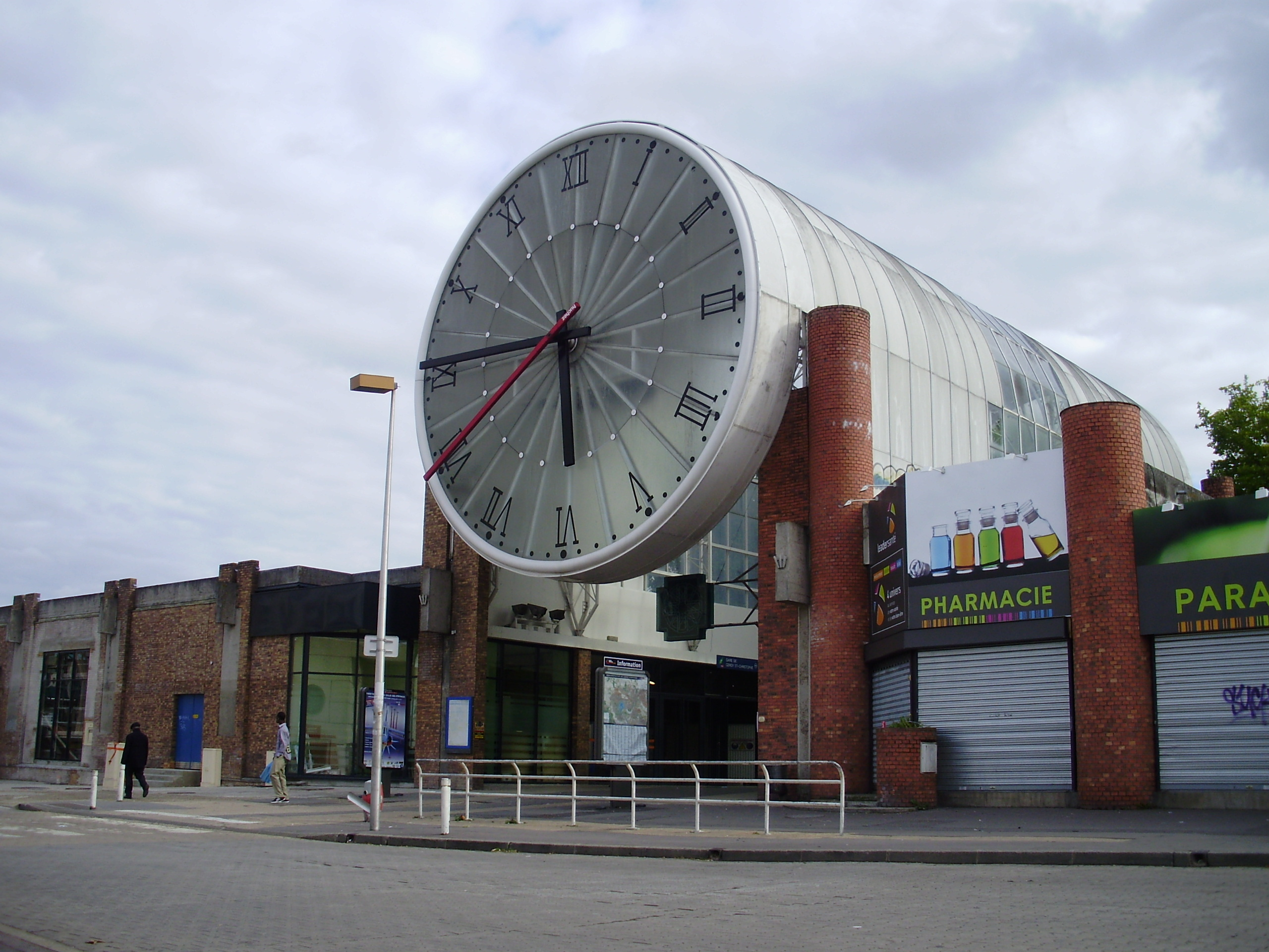 Gare de Cergy-Saint-Christophe, à Cergy, Val-d'Oise, France : passage de l'Horloge, vu du côté nord, dans lequel se trouve l'entrée de la gare